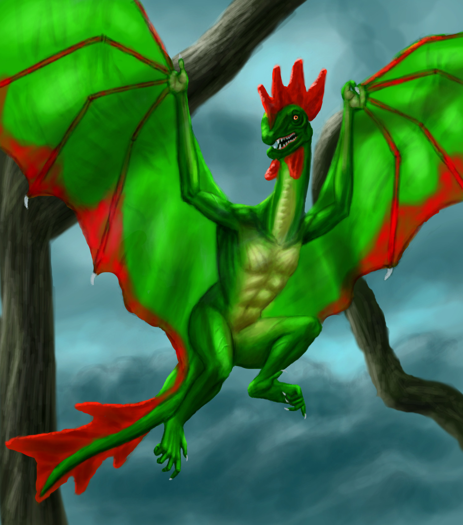 Цмок (дракон) - существо из беларуской мифологии